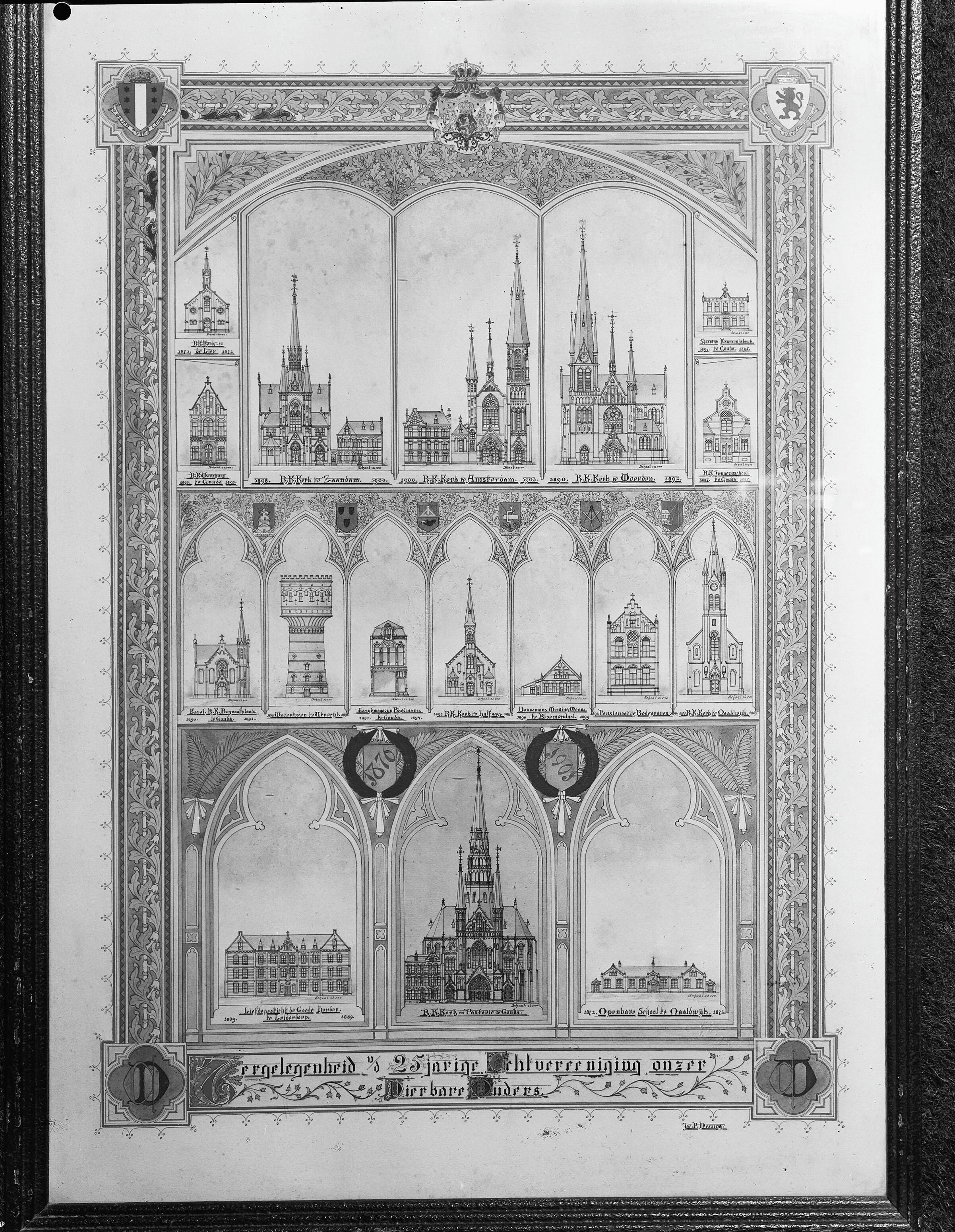 Bouwwerken gemaakt door de aannemer/architect C.P.W. Dessing tekeningen + foto in bezit van J.P. Dessing, Marathonlaan 237, Gouda.